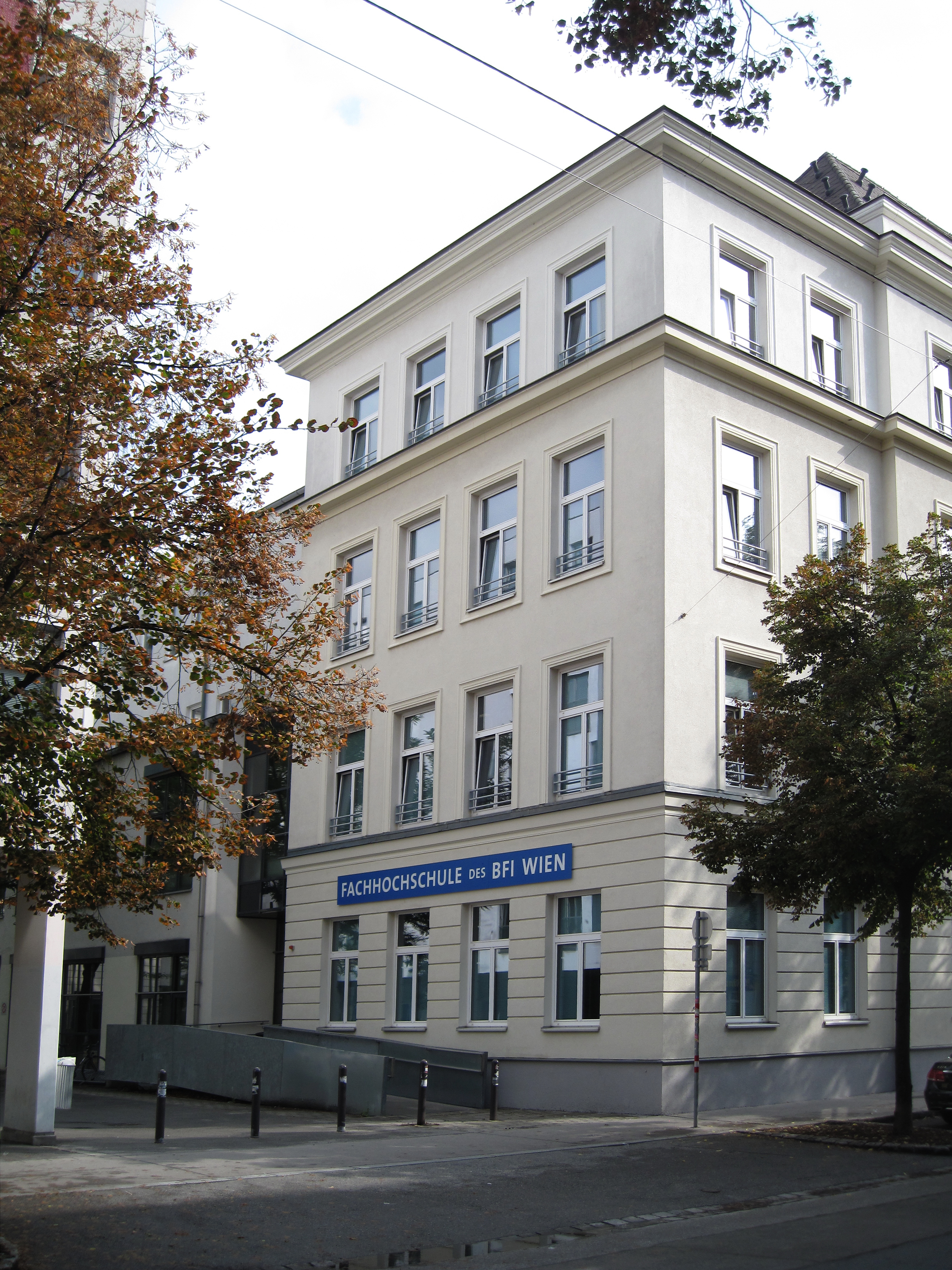 Fachhochschule des BFI Wien, Wohlmutstraße/Ecke Stuwerstraße in Wien. Eingangsbereich Stuwerstraße.